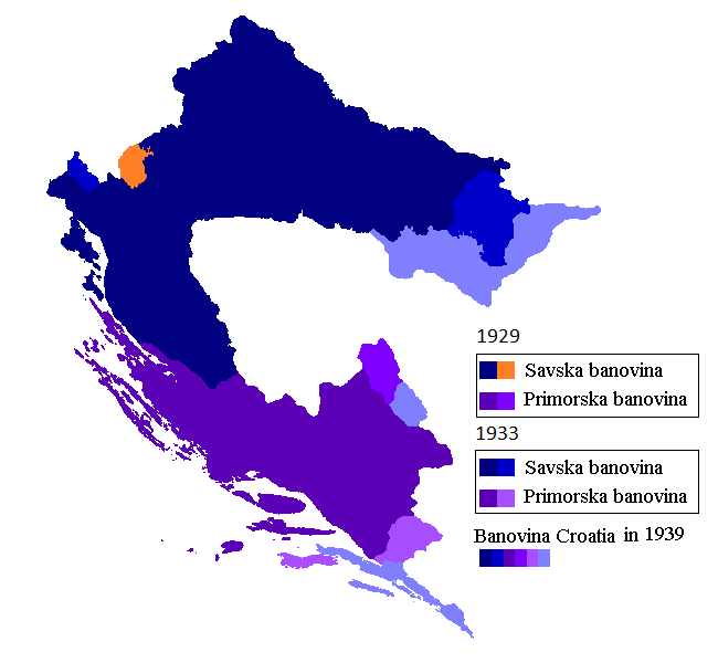 Dodao detalje s razlikama između granica Savske i Primorske banovine 1929. i 33. na ovu kartu